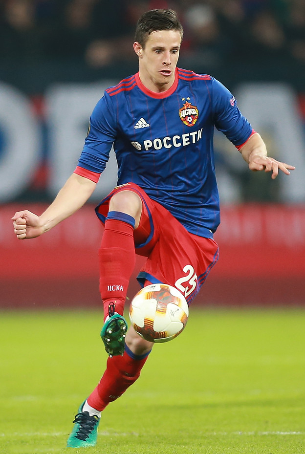 ЦСКА упустил победу над «Арсеналом» и покинул Лигу Европы